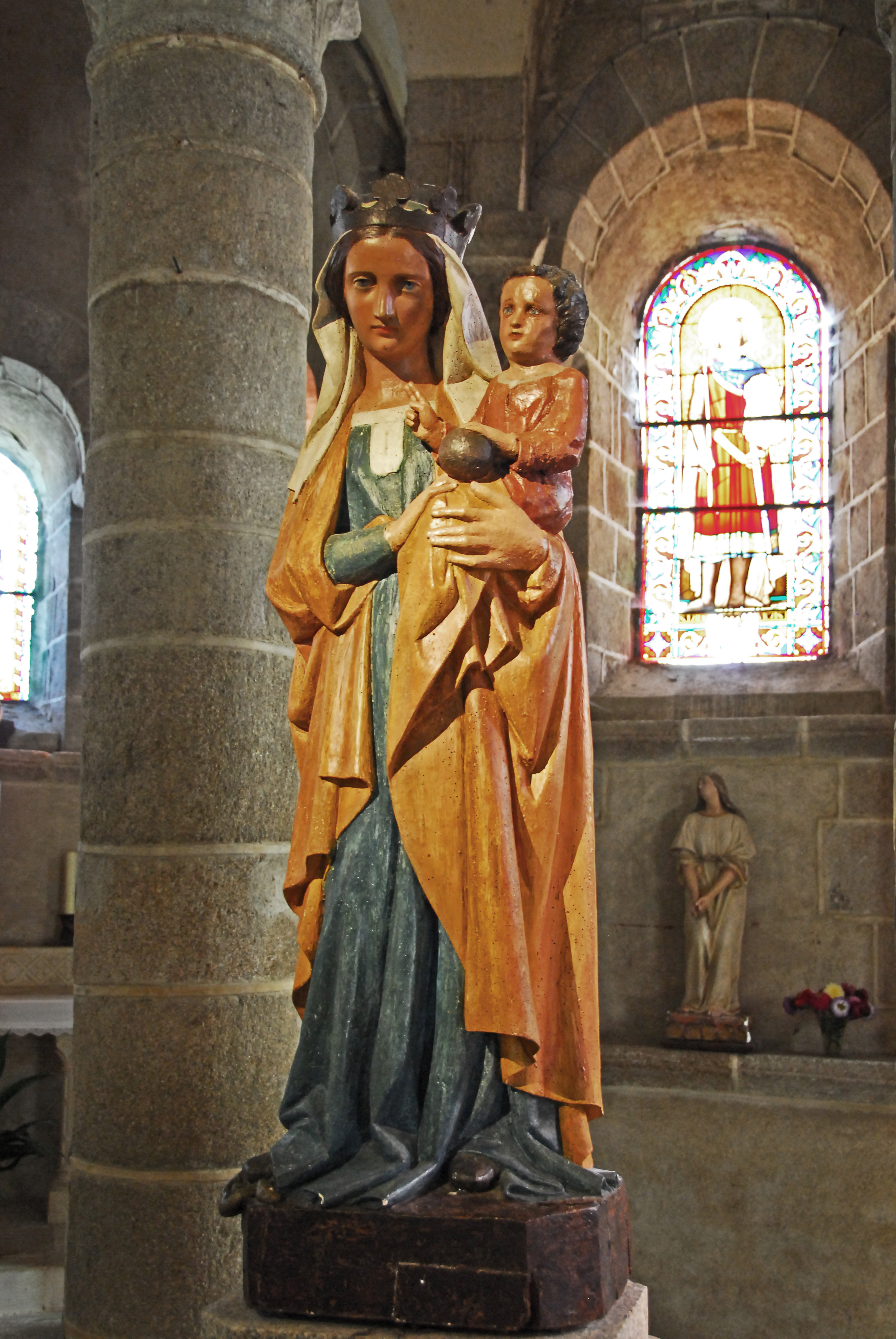 N.-D. de Châtel-Montagne, Madonna m. Kind, 15.Jh.